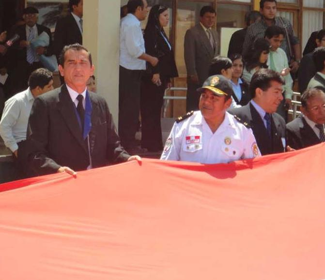 Cesar Chavez Paz , Alcalde del distritro de San Josè - Pacasmayoi